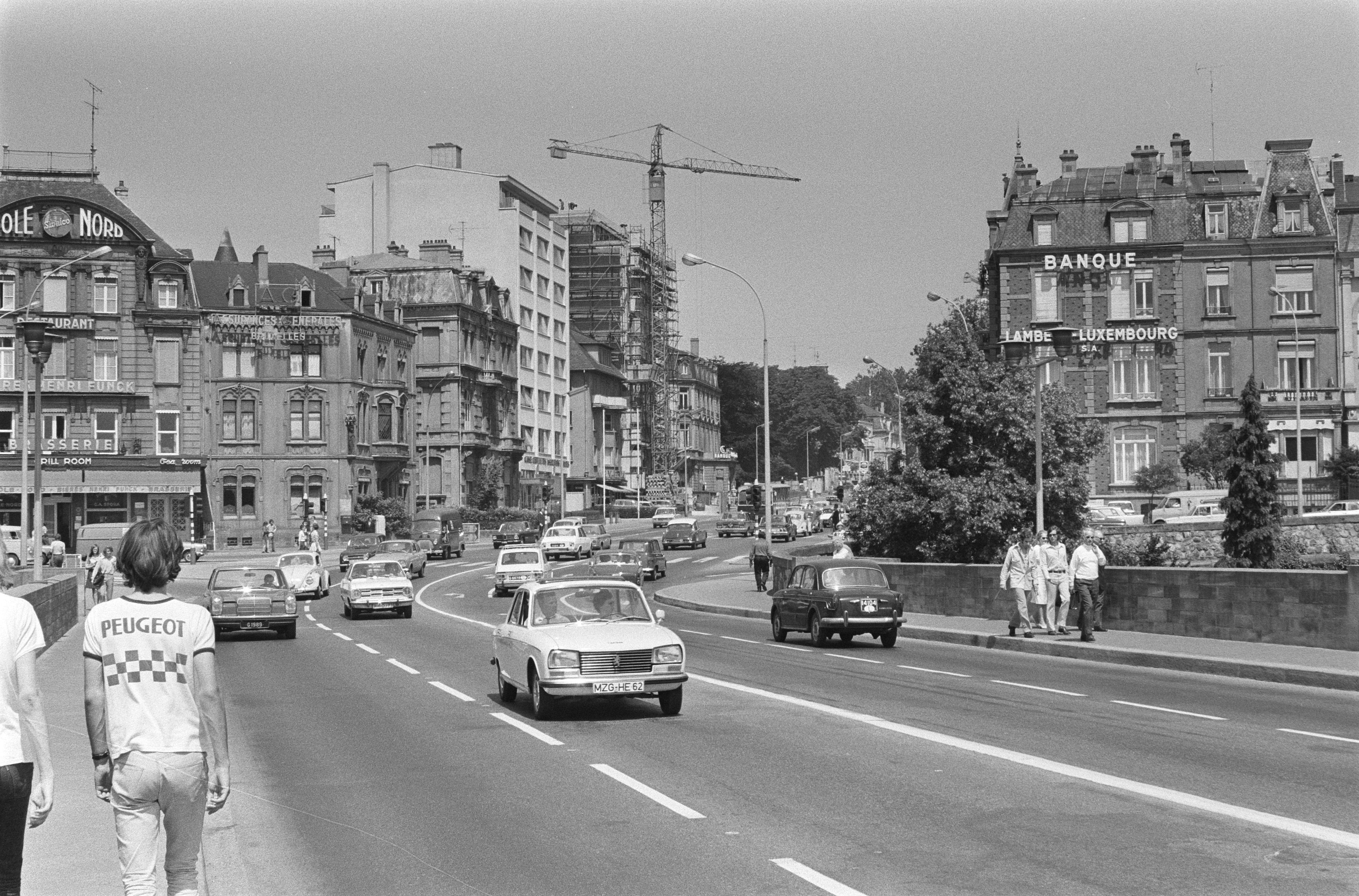 Collectie / Archief : Fotocollectie Anefo Reportage / Serie : [ onbekend ] Beschrijving : Stadsgezichten Luxemburg, nr. 13 Boulevard Royal vanaf Pont Adolphe Datum : 7 juli 1971 Locatie : Luxemburg Trefwoorden : Stadsgezichten Fotograaf : Evers, Joost / Anefo Auteursrechthebbende : Nationaal Archief Materiaalsoort : Negatief (zwart/wit) Nummer archiefinventaris : bekijk toegang 2.24.01.05 Bestanddeelnummer : 924-7164